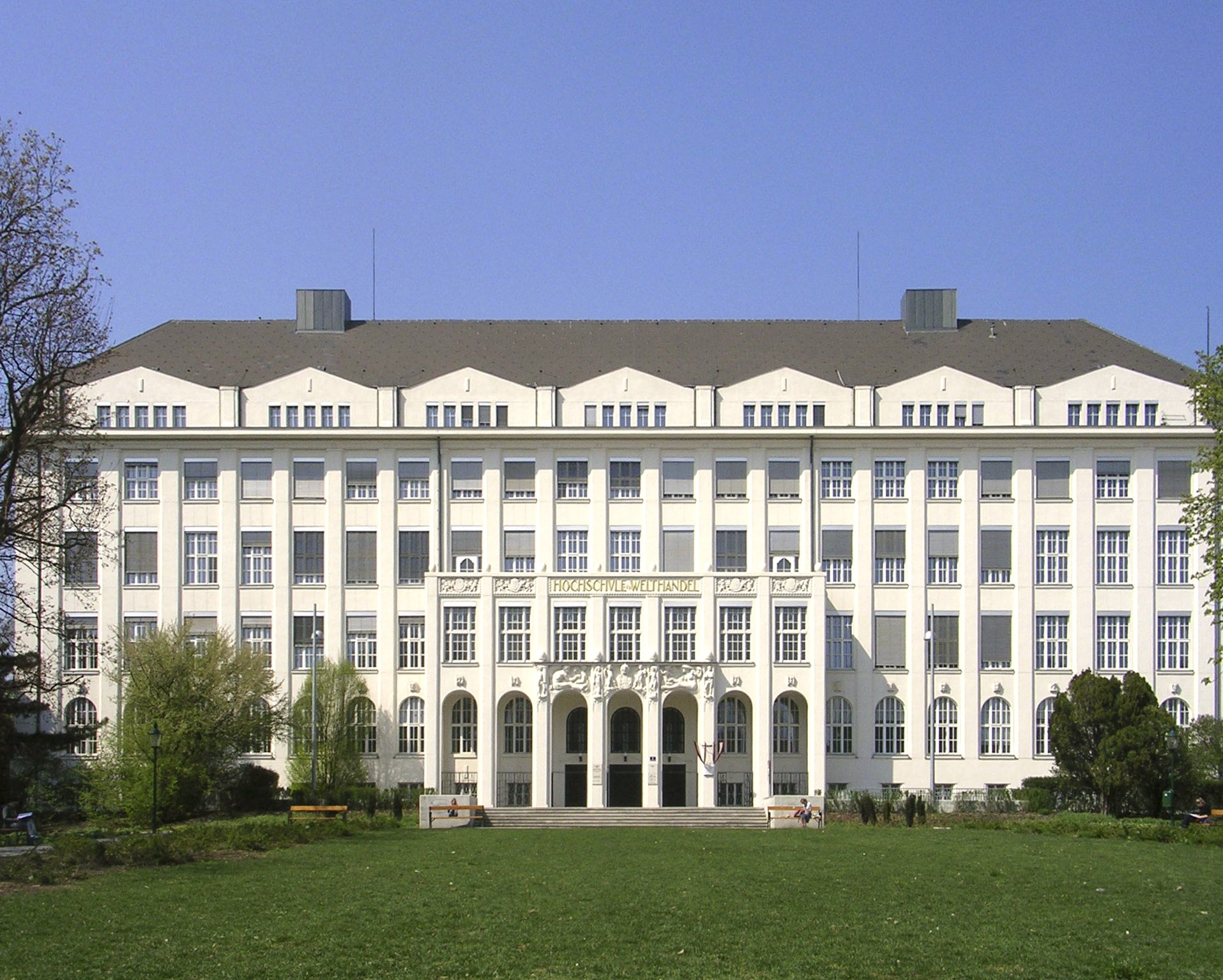 Old Building of the Wirtschaftsuniversität Wien